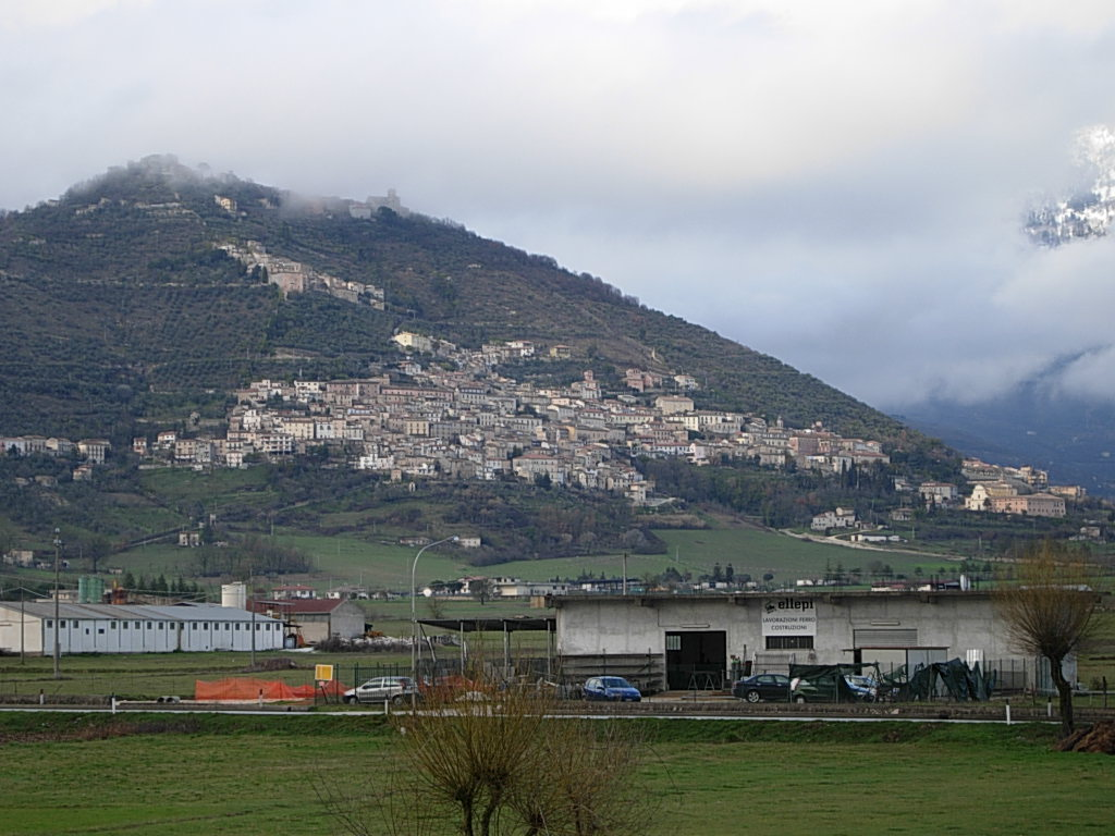 Panorama di Alvito (FR) Foto personale concessa in PD